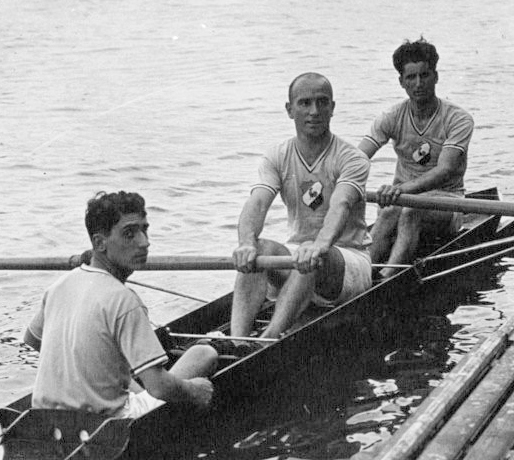 Suresnes : championnats d'Europe d'avirons : 2 rameurs avec barreur : Brussat, Ginat, Brunet : [photographie de presse] / Agence Meurisse